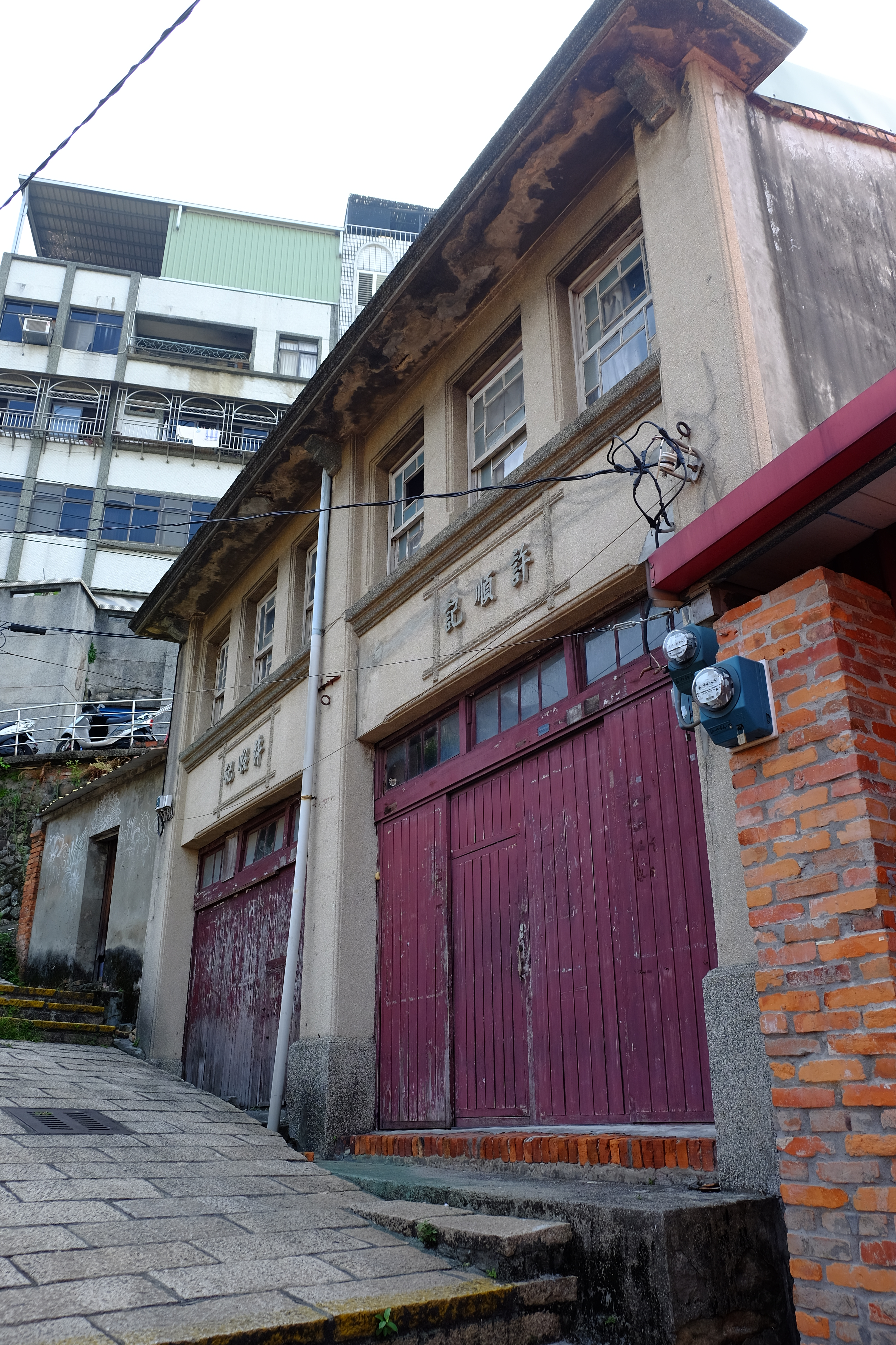 中文（台灣）: 淡水重建街街屋